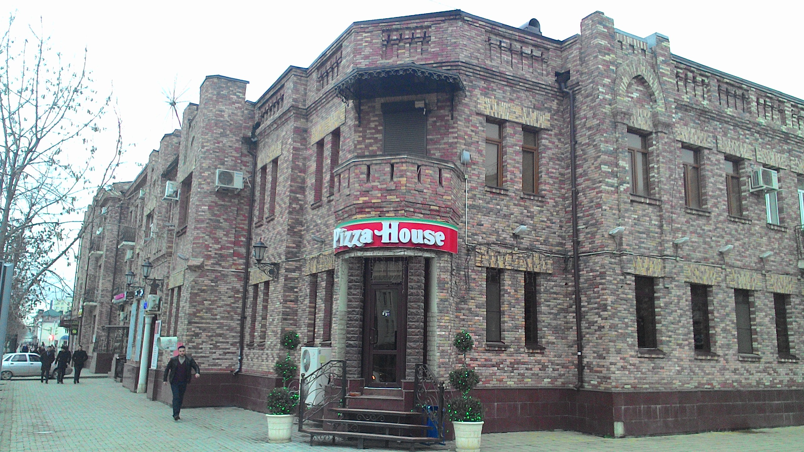 Барский дом